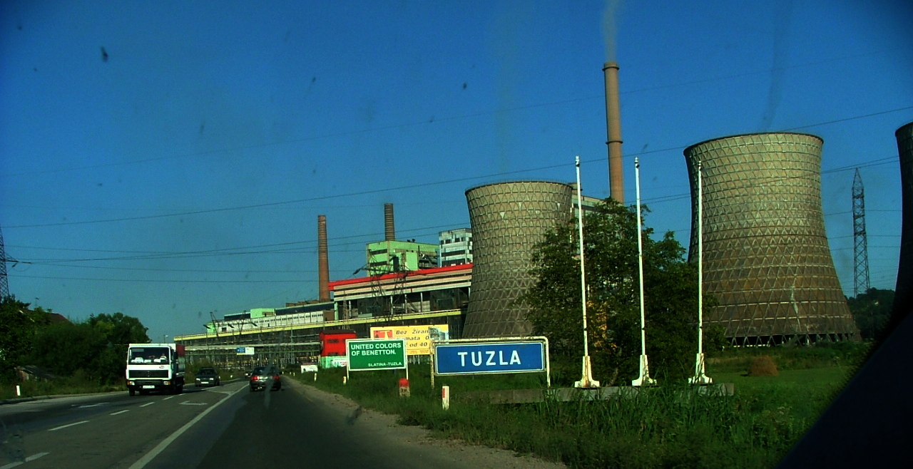 Entrada de la localidad de Tuzla, en Bosnia y Herzegovina